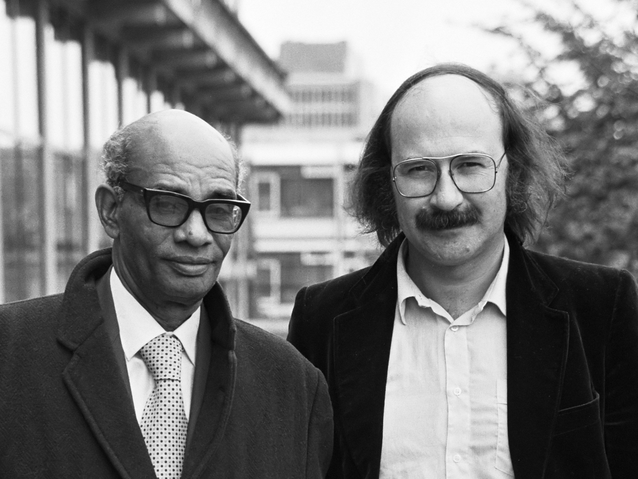 Congres Dichters uit de Derde Wereld; Sipho Sepamla (links) en Antonio Skarmeta 2 oktober 1981